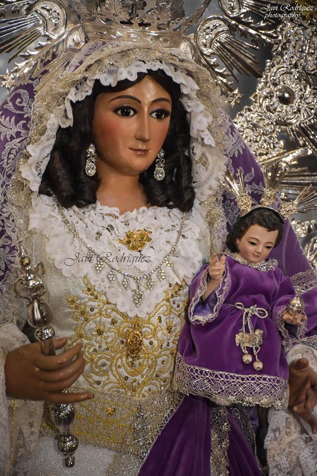 Ntra Señora de las Nieves de Benacazon